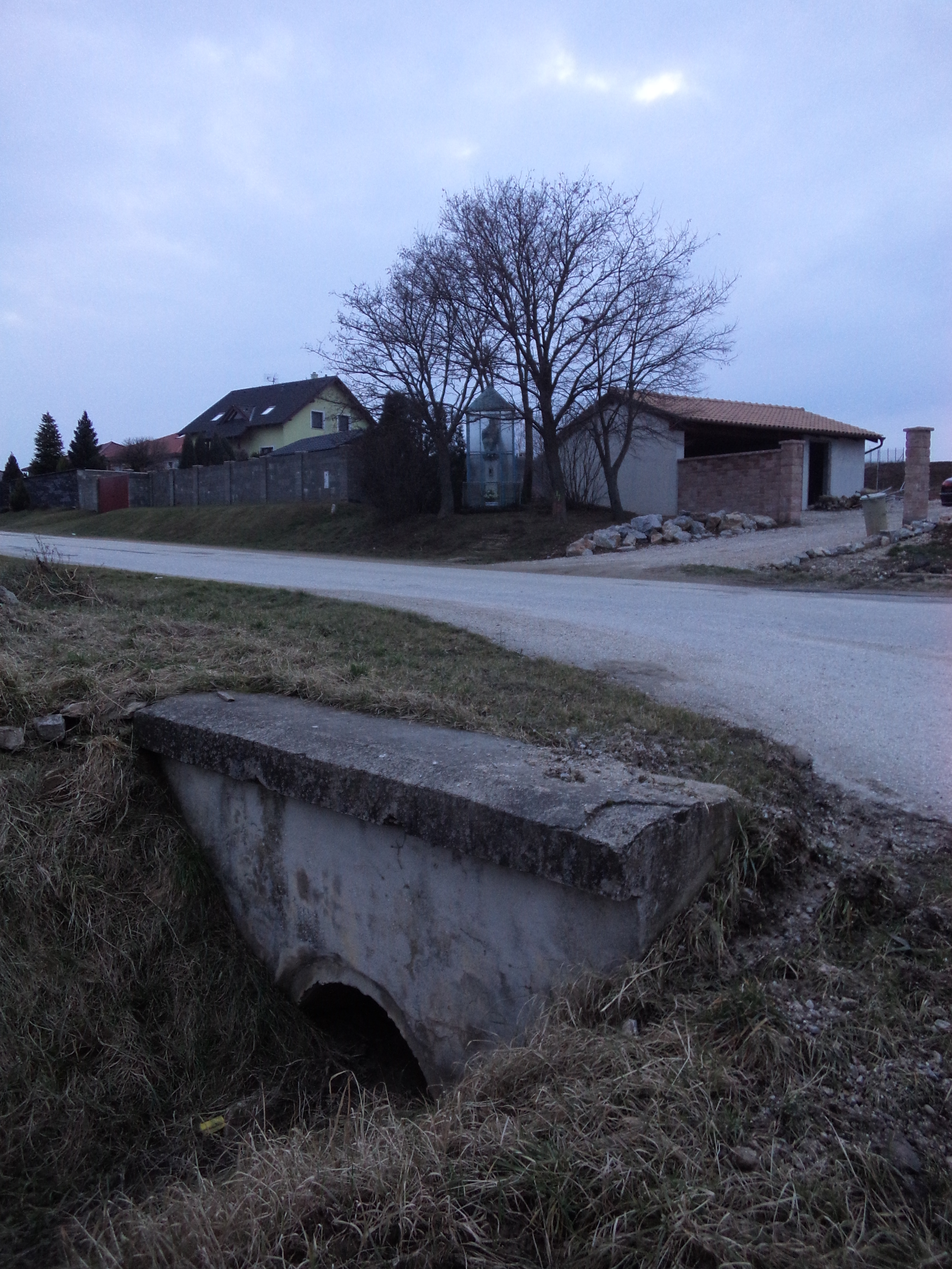 Kislapás